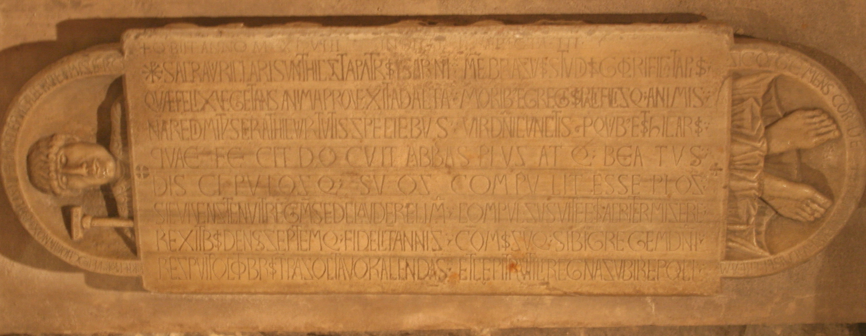 Pierre tombale d'Isarn dans les cryptes de Saint-Victor à Marseille